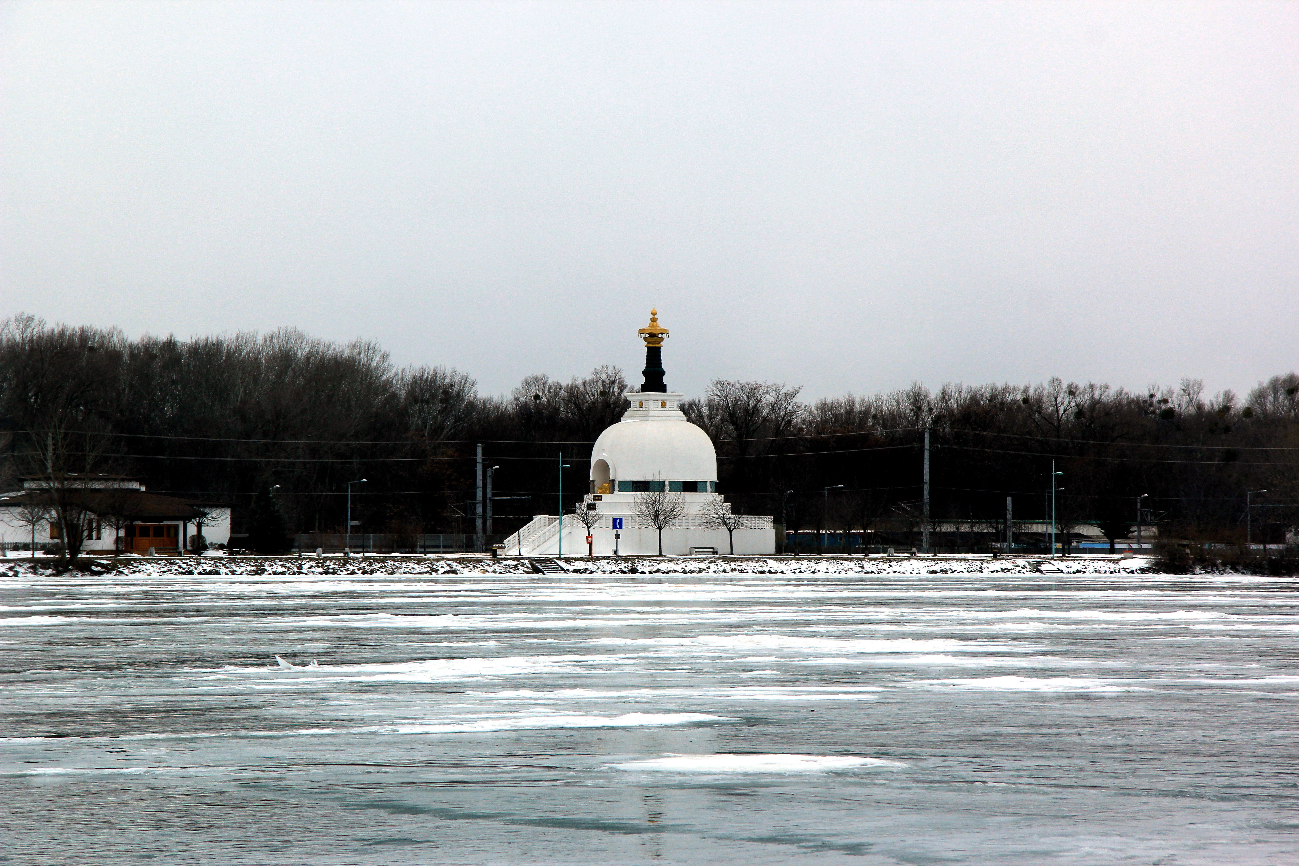 Donau in Wien im Stauraum des Kraftwerks Freudenau während der Kältewelle 2012